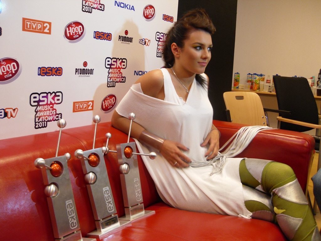 Ewa Farna Zdjęcie zrobione podczas Eska Music Awards 2011 w katowickim Spodku.